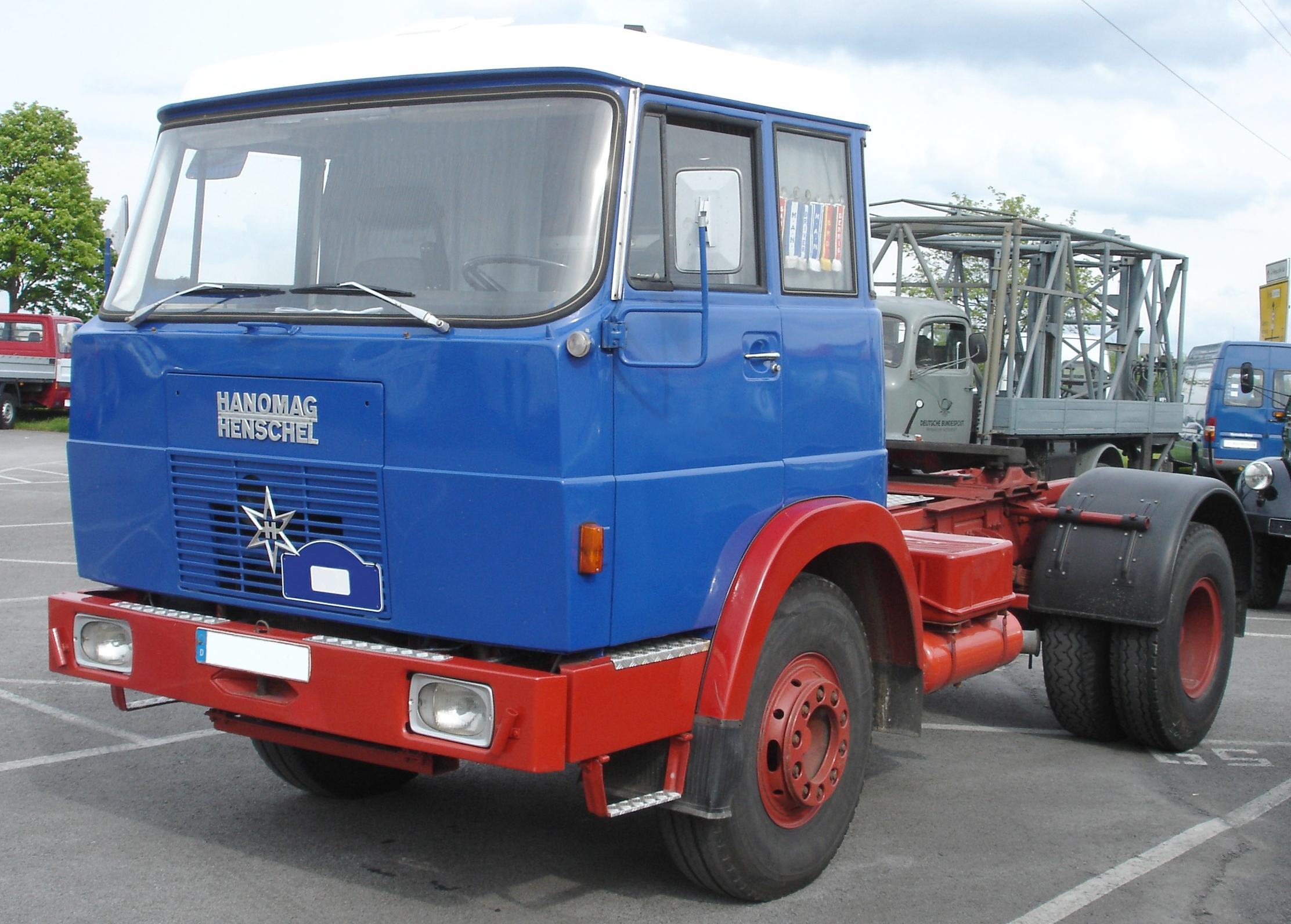 Lkw Hanomag-Henschel F161S Sattelschlepper